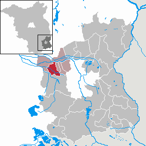 Werben in Brandenburg (Country) - District Spree-Neiße